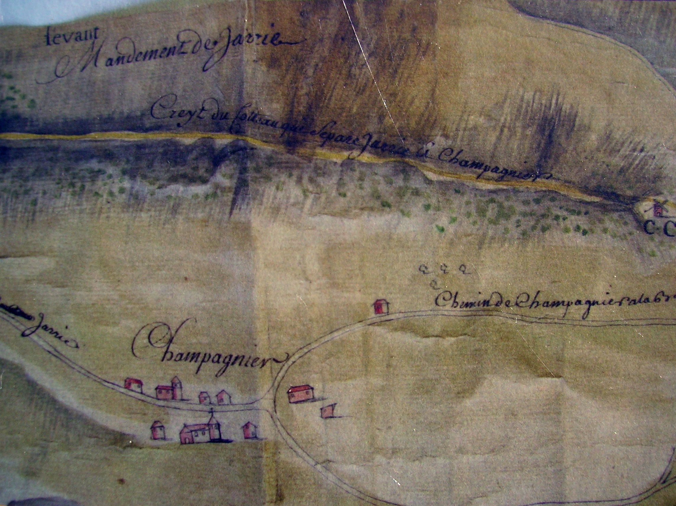 Détail de carte extraite d'un cadastre ancien. Photo Robert Alliaud, affiché sur un panneau touristique près du Saut du Moine. Champagnier, Isère, AuRA, France.